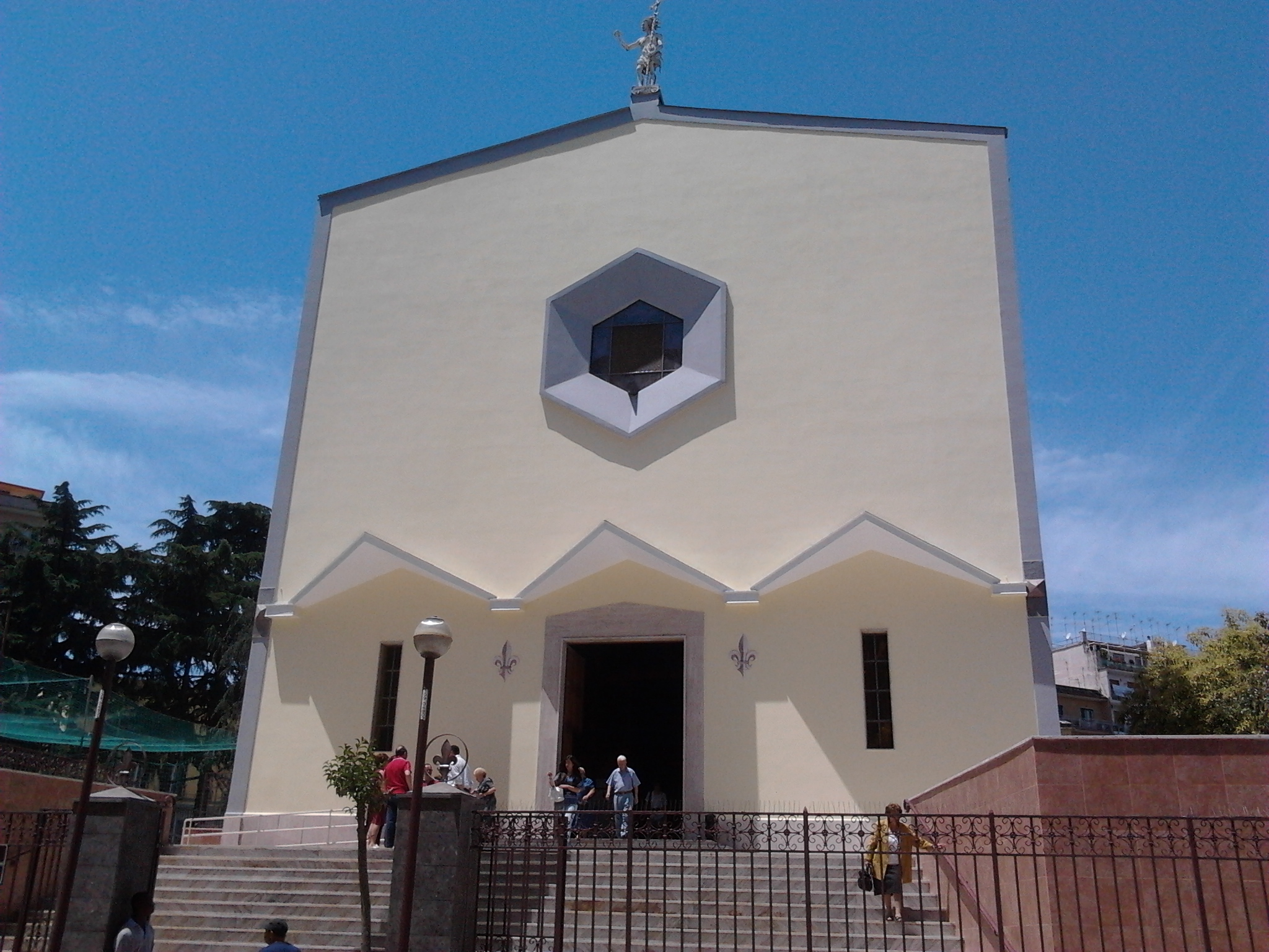 Facciata della Chiesa di San Giovanni Battista dei Fiorentini